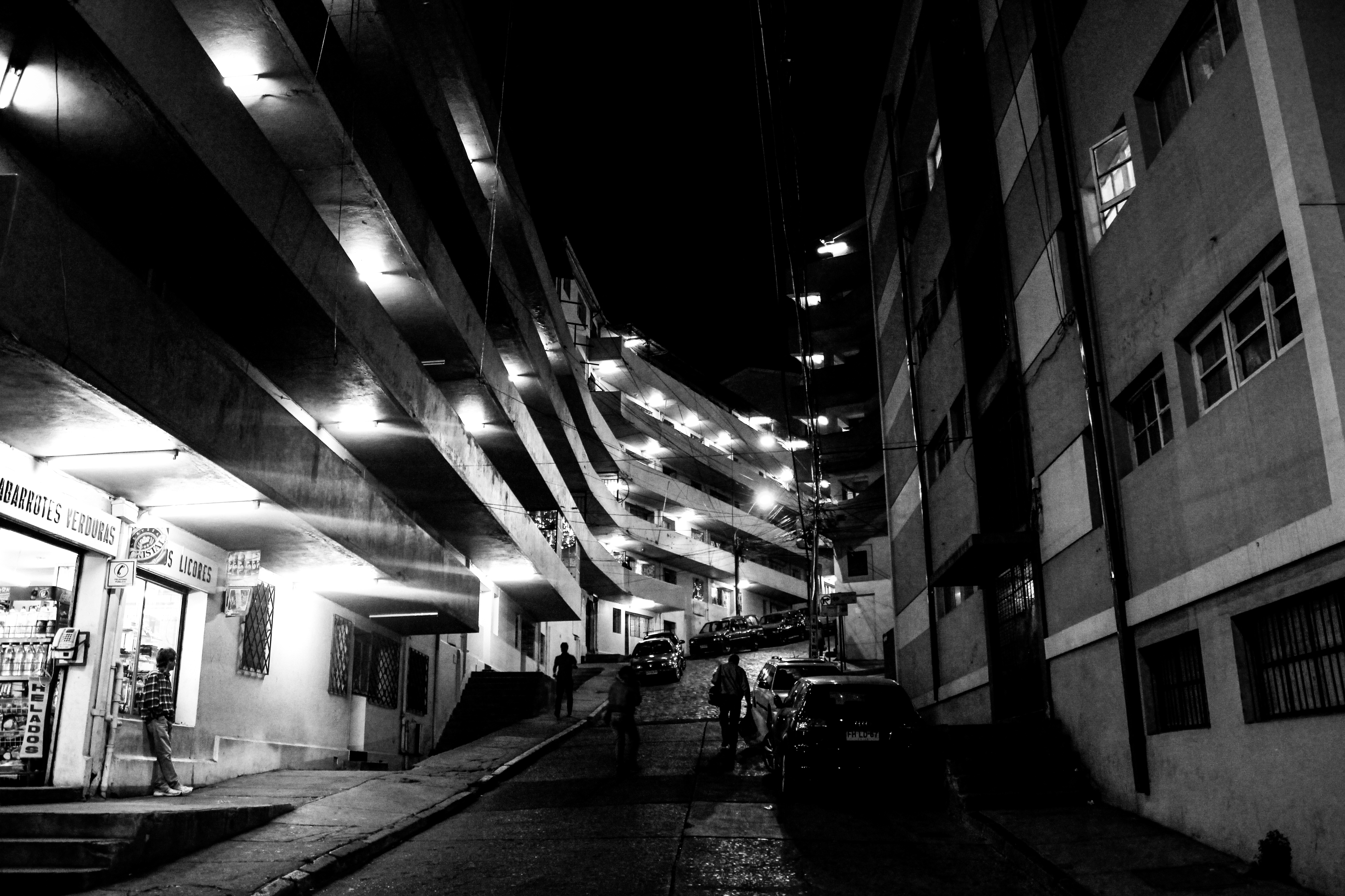 Conjunto Habitacional Quebrada Marquez de noche This is a photo of a national monument in Chile: 473